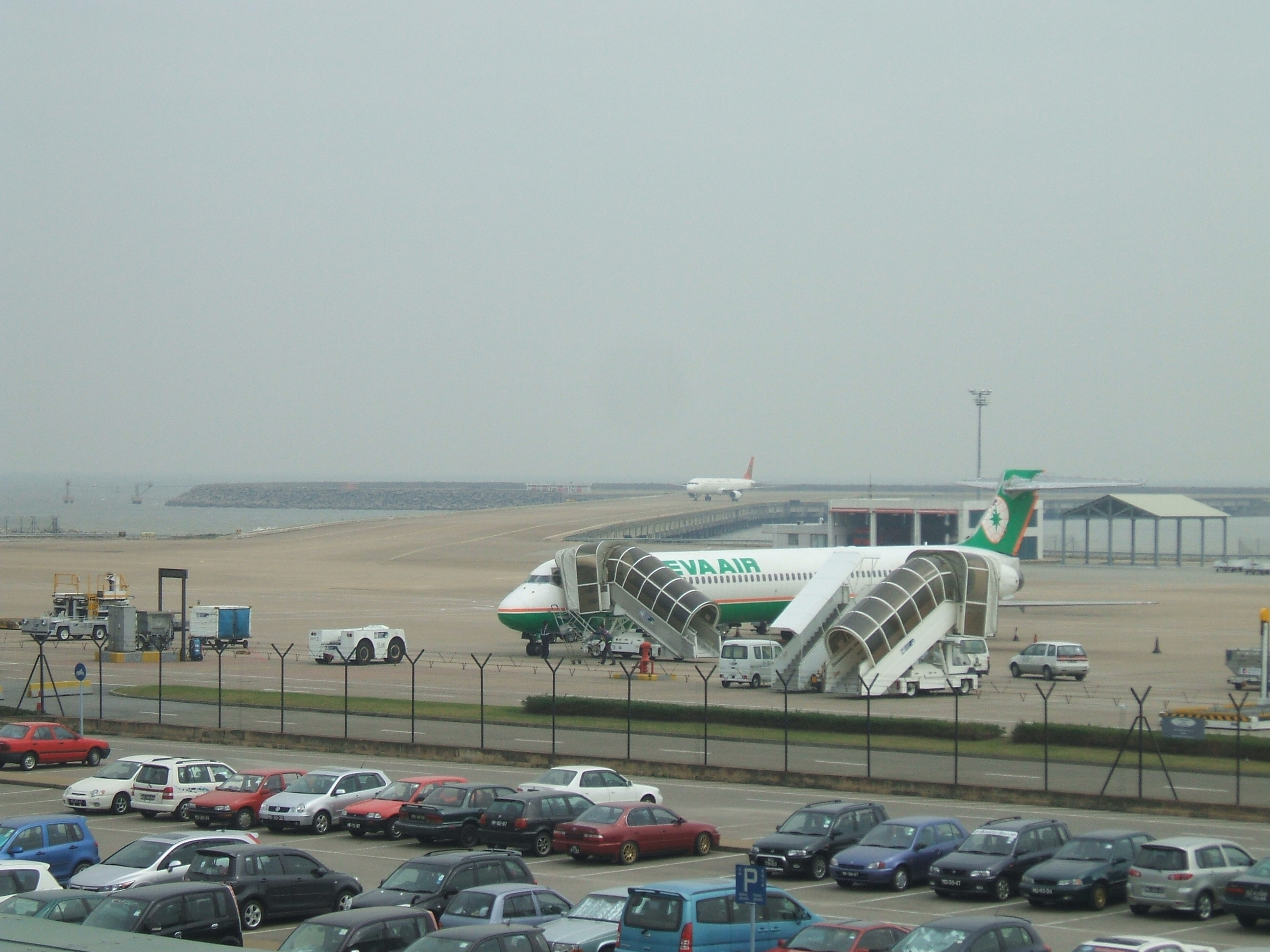 澳門国際空港誘導路